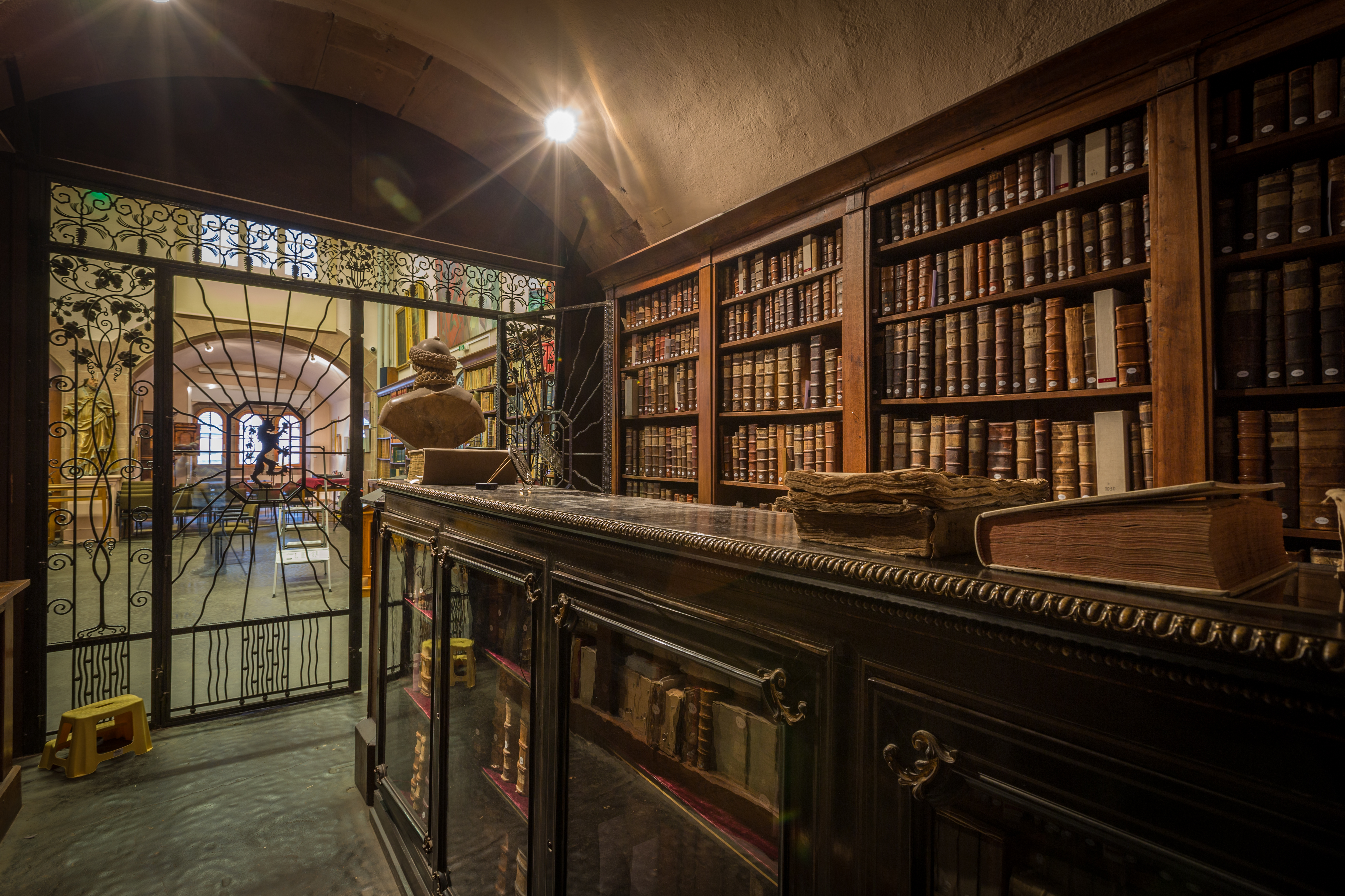 Bibliothèque humaniste de Sélestat 21 janvier 2014. Descriptions à venir